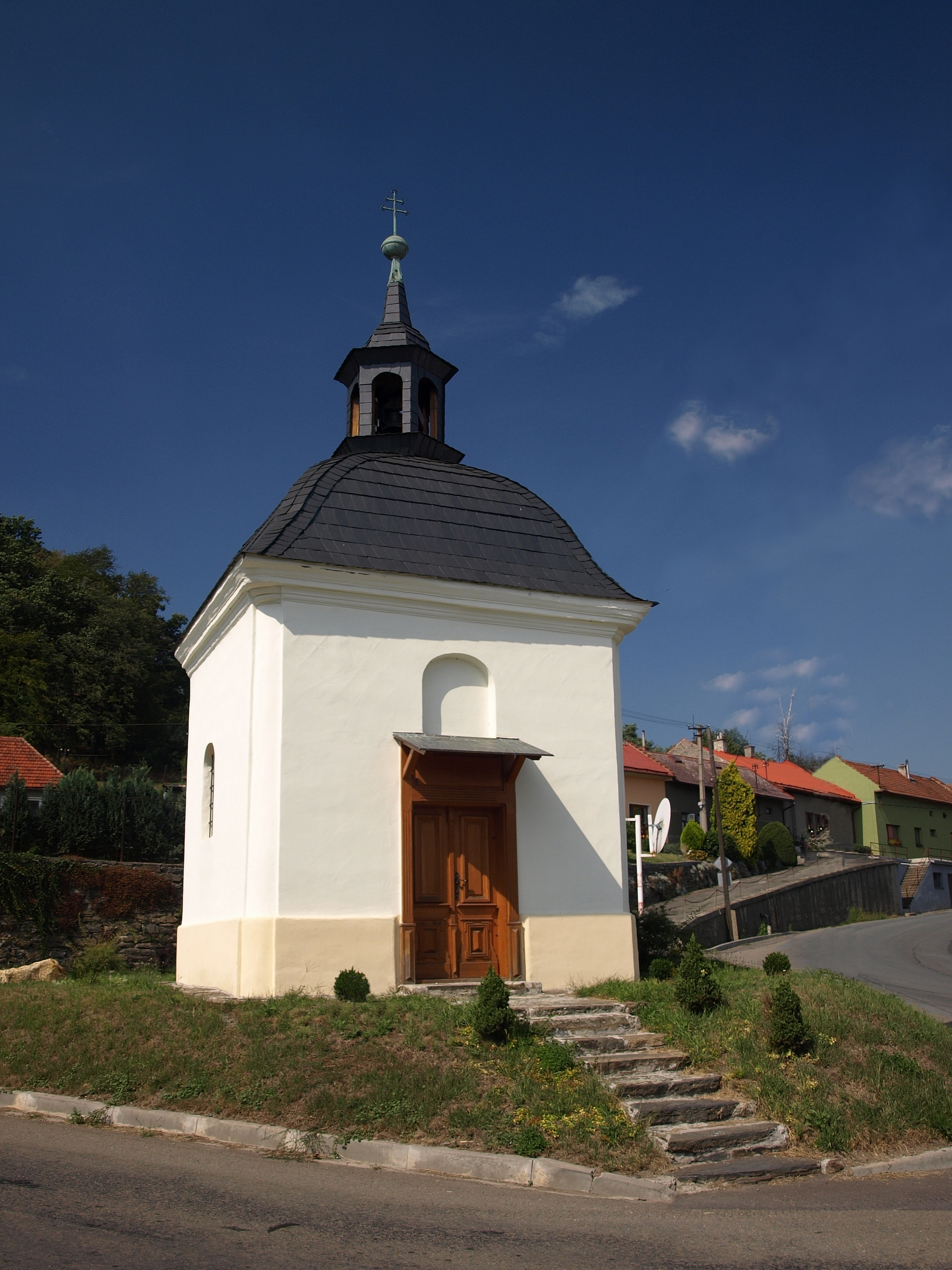 Kaple sv. Urbana (Buk), náves, Buk